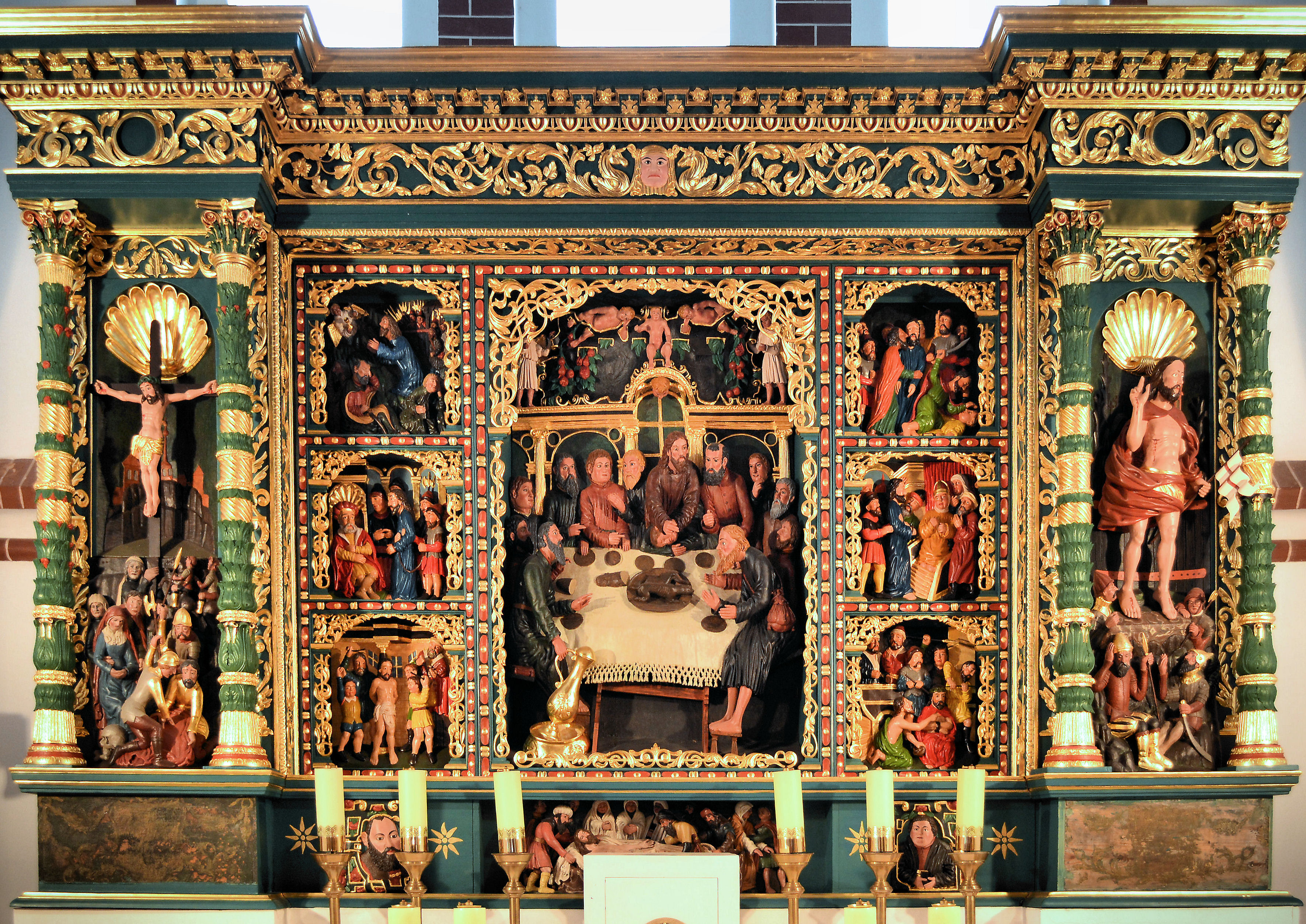 Ołtarz w kościele w Sownie (powiat stargardzki)